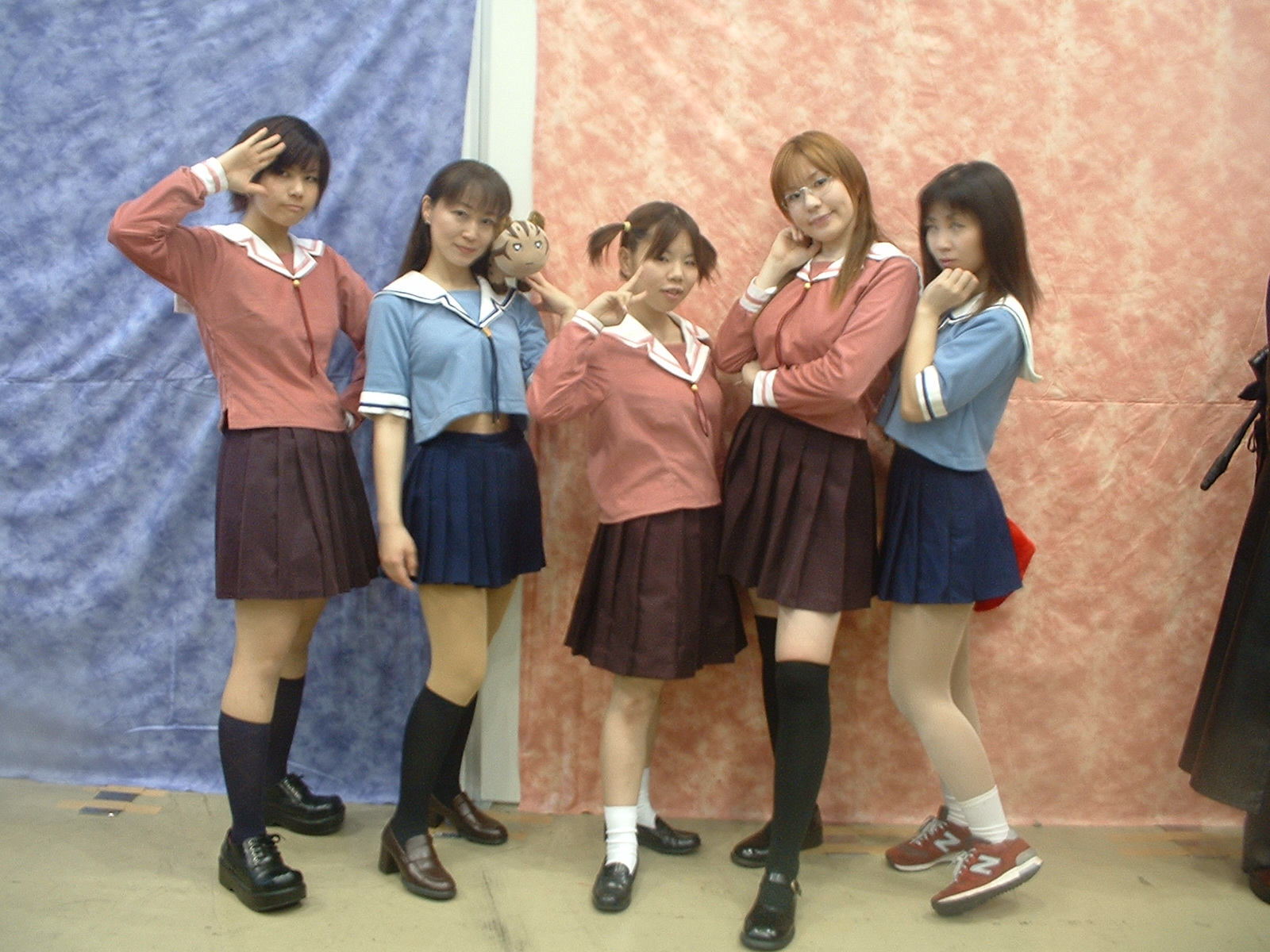 World Cosplay Festival，《笑園漫畫大王》cosplayer群。